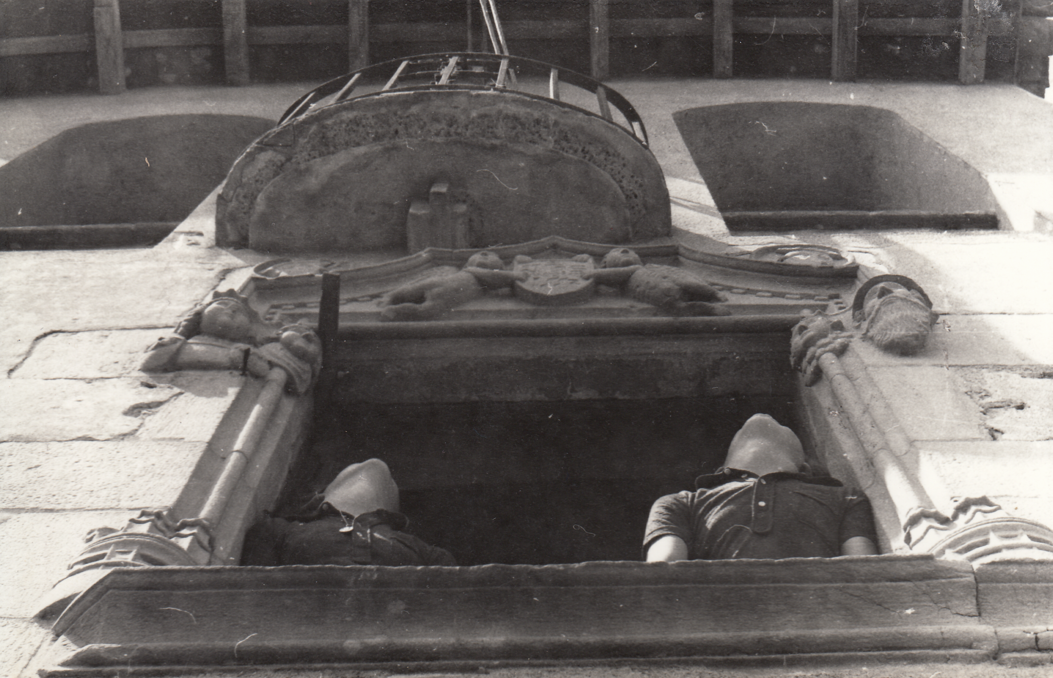 Detalle de la ventanta de la masía de Can Marata. En los años 1900 la casa fue habitada por la familia Benet Sala y a partir de 1920 por la familia Rius Droguet procedentes del Moyanés